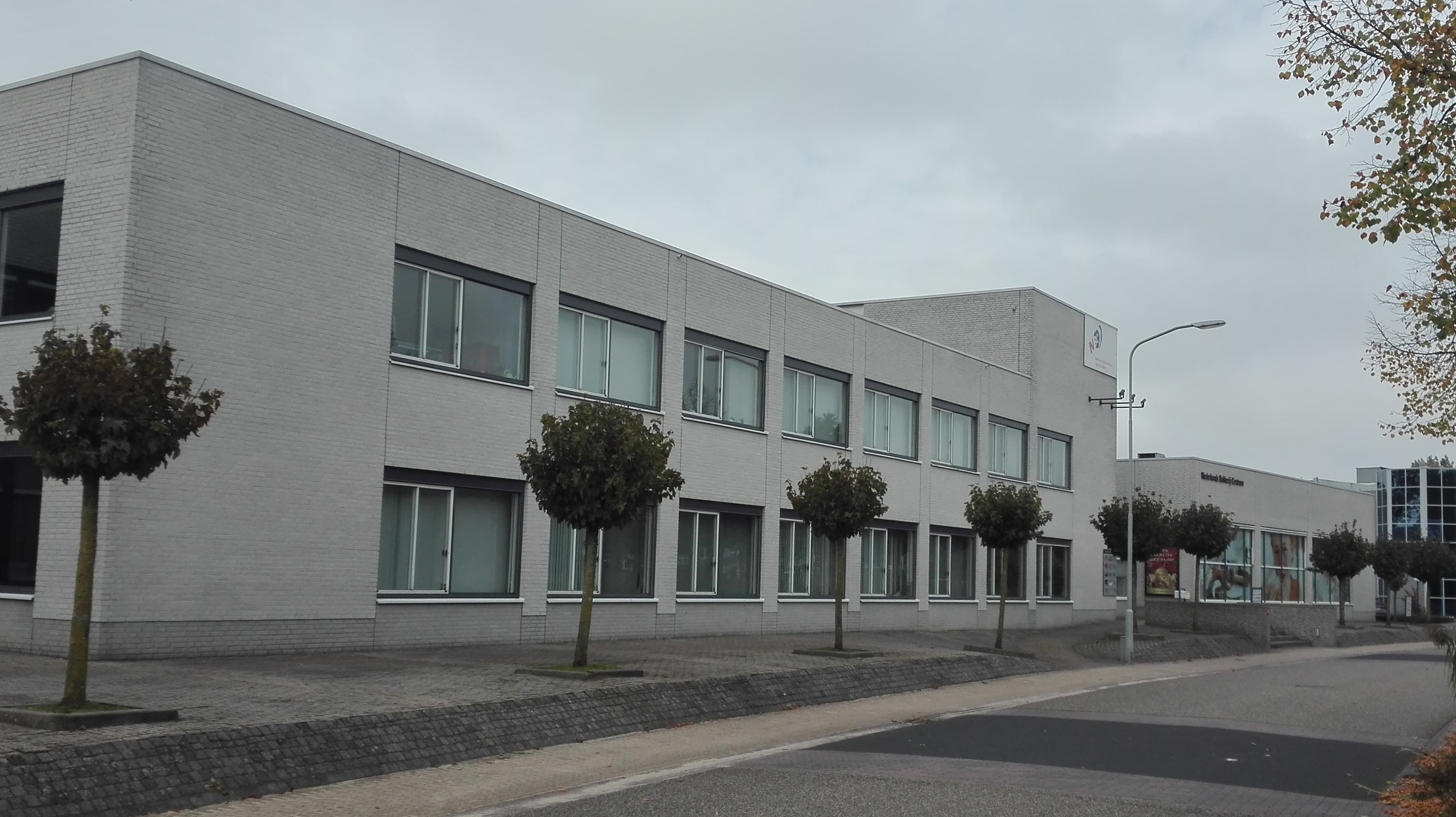 Nederlands Bakkerij Centrum, Wageningen (2017)